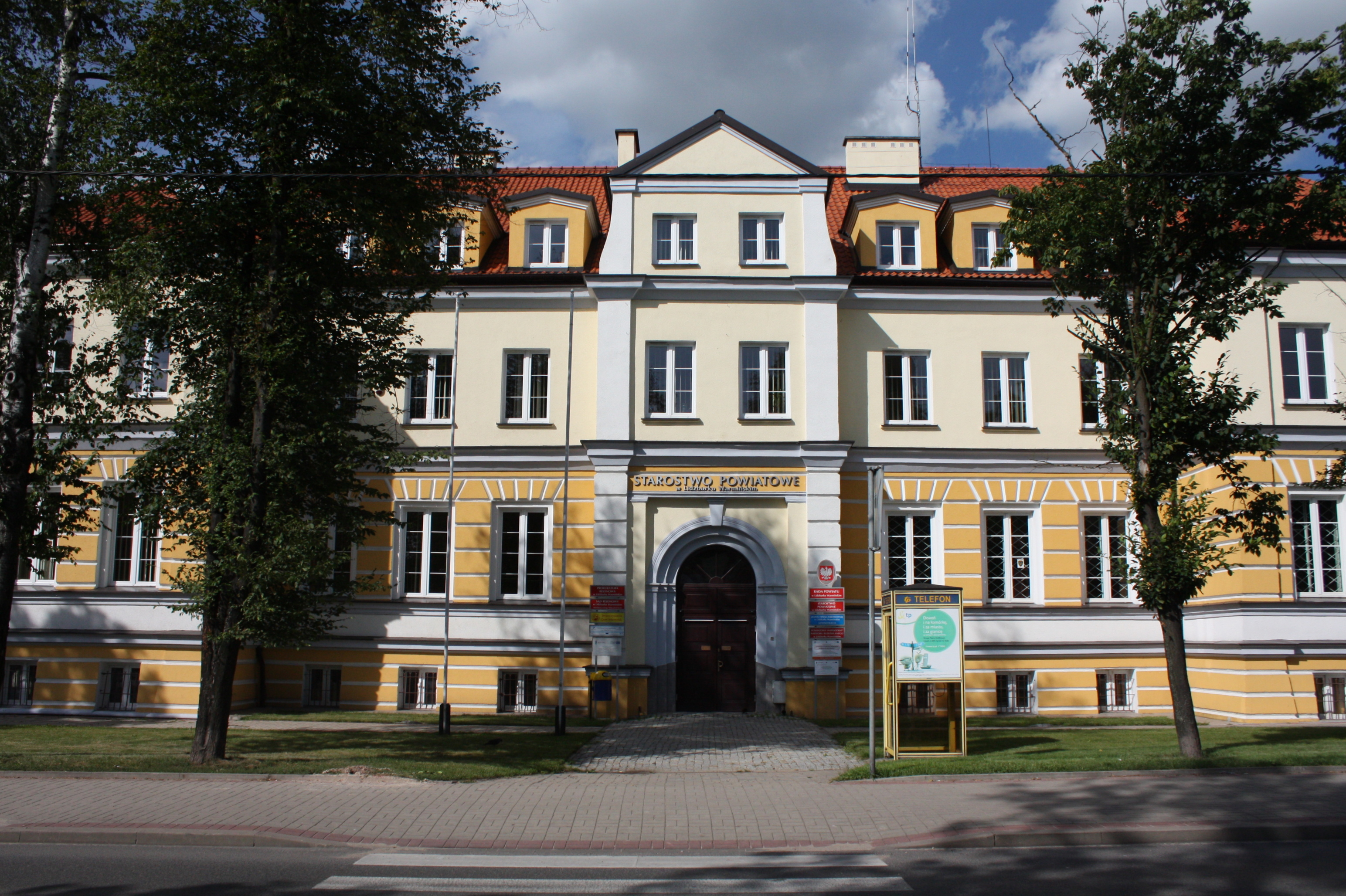 Lidzbark Warmiński, ul. kard. Stefana Wyszyńskiego 37 - Starostwo Powiatowe This photo of Warmian-Masurian Voivodeship was taken during Wikiexpedition 2012 set up by Wikimedia Polska Association. You can see all photographs in category Wikiekspedycja 2012. The making of this document was supported by Wikimedia Polska.